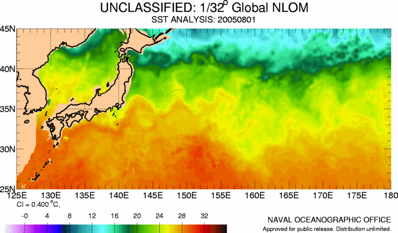 Wassertemperatur des Kuroshio am 01. August 2005. Die Grafik zeigt den Wärmetransport der Strömung und die dadurch verglichen mit dem Umgebungswasser erhöhte Temperatur vor der Ostküste Japans.